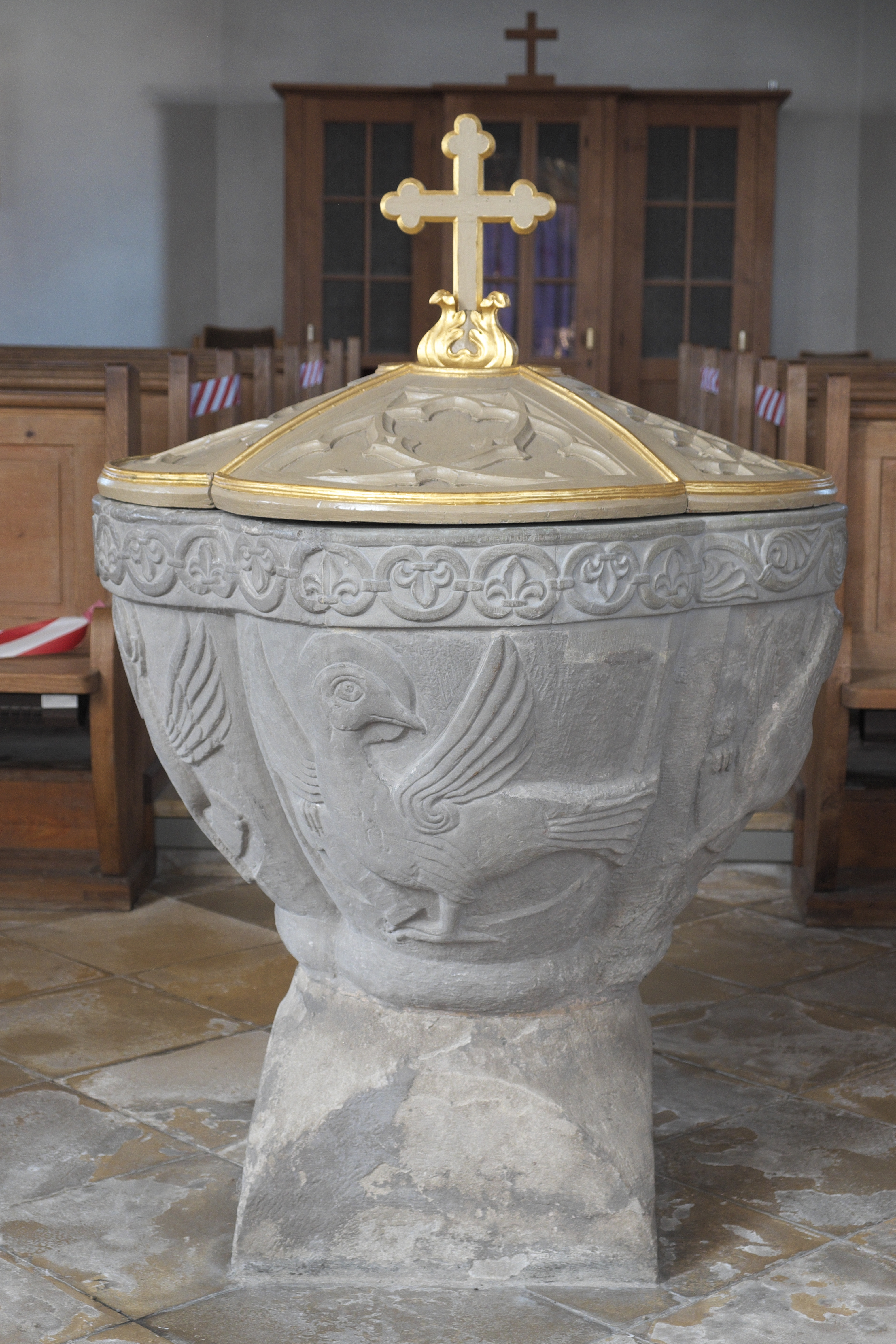 Katholische Pfarrkirche St. Stephan in Kissing im scchwäbischen Landkreis Aichach-Friedberg (Bayern/Deutschland), Taufbecken aus der zweiten Hälfte des 12. Jahrhunderts, mit den Reliefs der Evangelistensymbole; Adler des Evangelisten Johannes